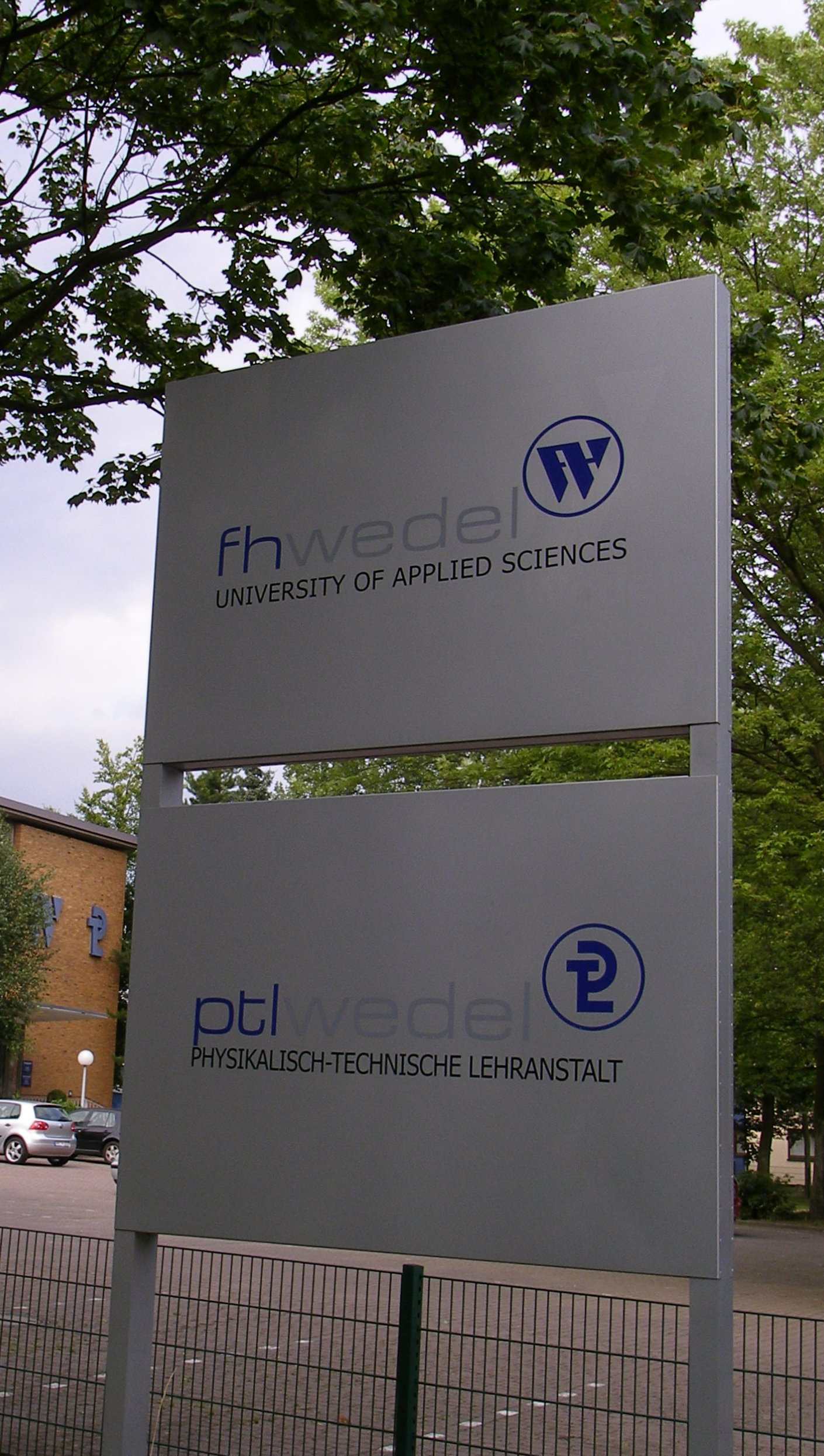 Foto vom Logo der FH Wedel und der PTL Wedel, abgebildet auf einem Schild an der Feldstraße.